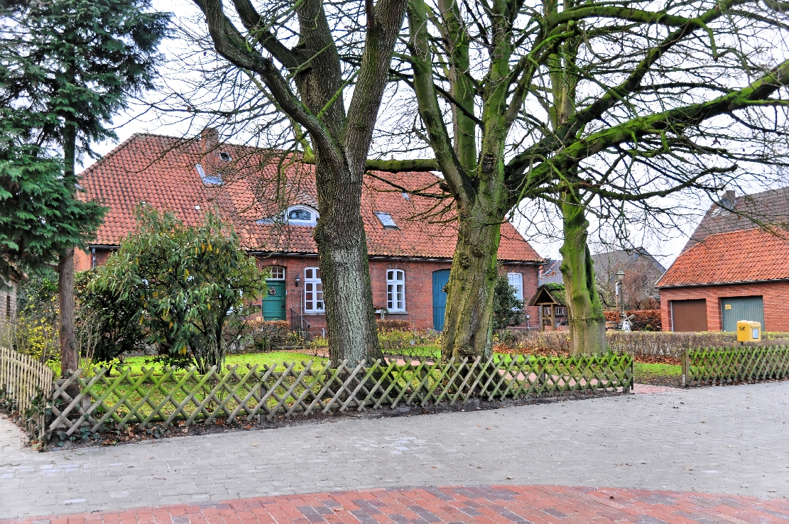 Neuenwalde: Amtshaus des Amtes Kloster Neuenwalde (ehem. Verwaltungseinheit bis 1852), jetzt Sitz des Heimatmuseums; 2012